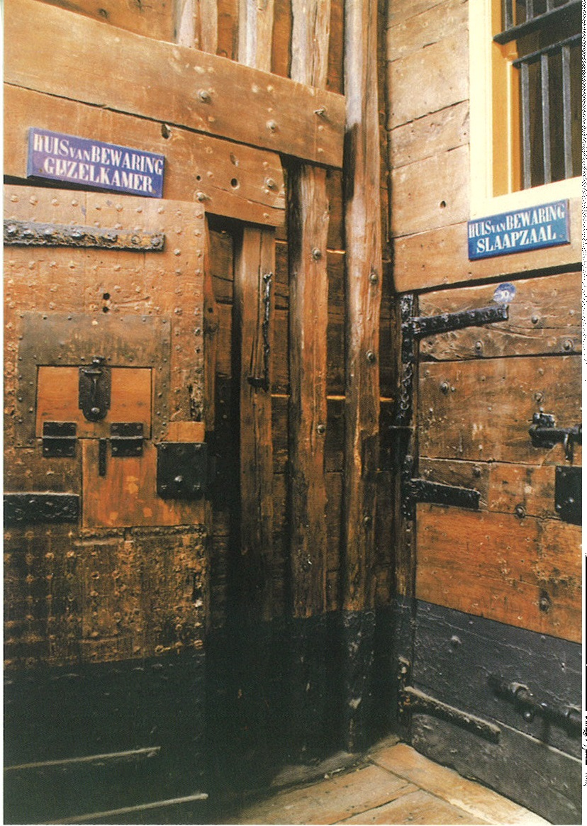 Foto binnenkant Gravensteen in Zierikzee, met oude cel deuren.